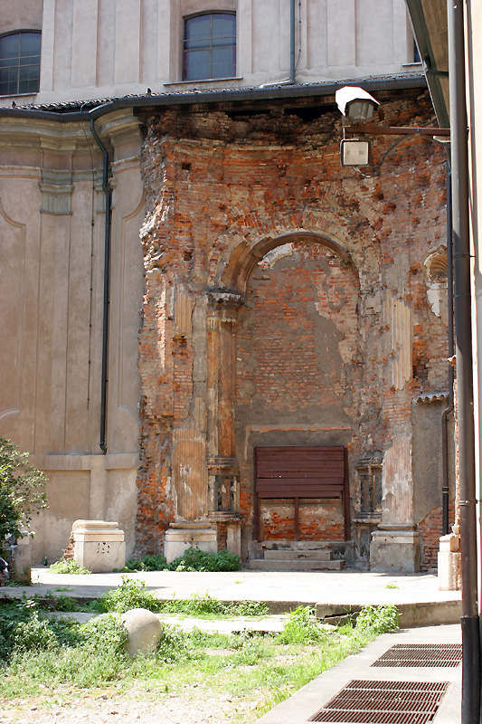 Ruderi della Cappella della Madonna del Grembiule, andata distrutta dai bombardamenti anglo-americani nel conflitto 1940-1945